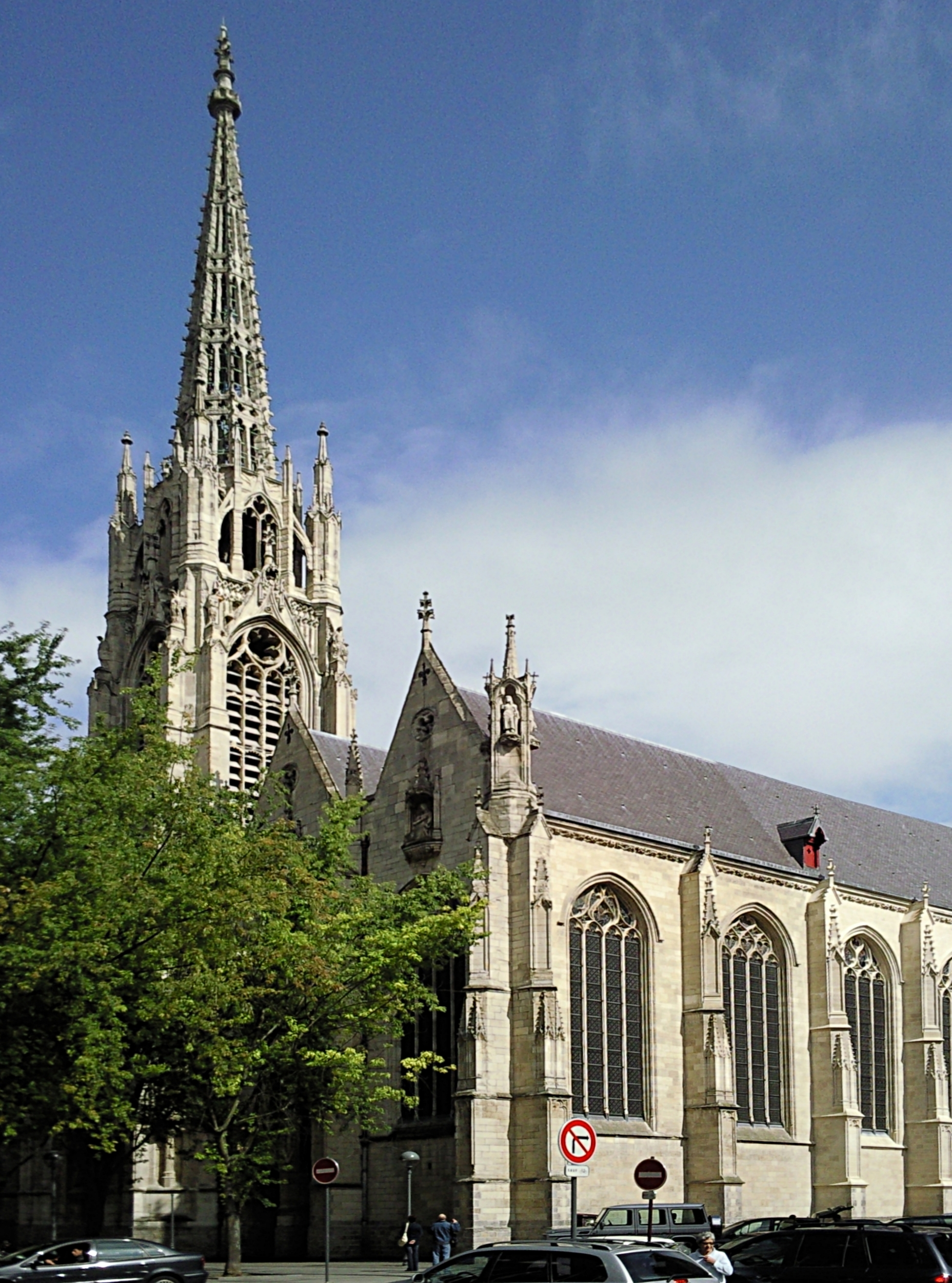 L'église Saint-Maurice à Lille (Nord).